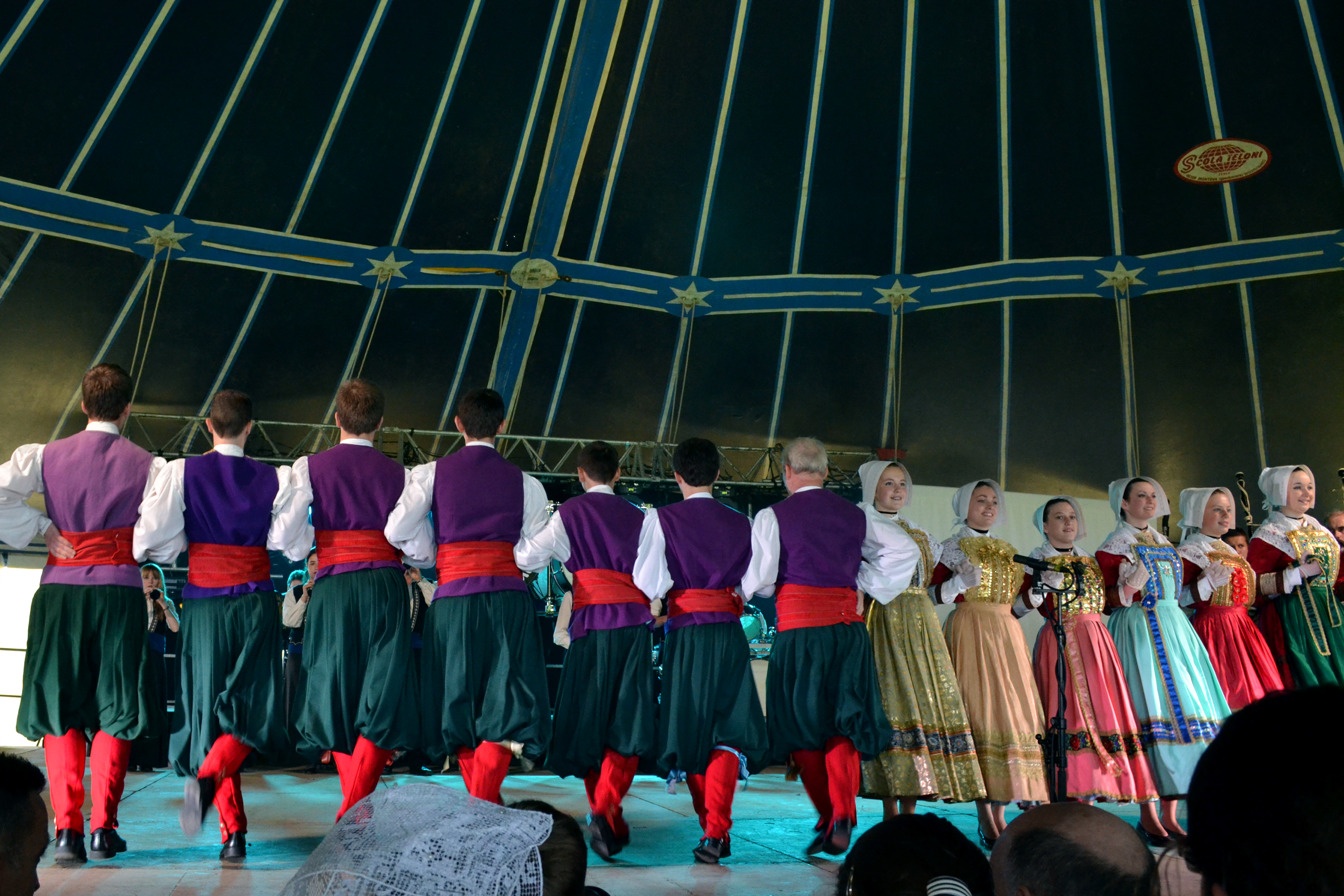 Le bagad Landi accompagné par l'ensemble Bleuniadur au Gouel Bro Leon à Plouvorn le 16 juin 2013.